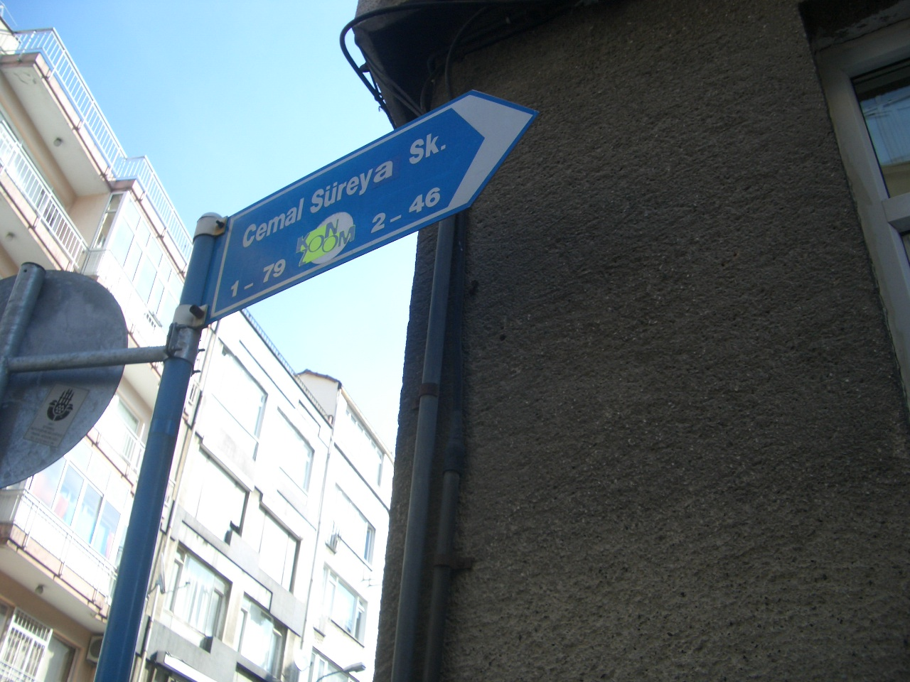 Cemal Süreyya Sokak